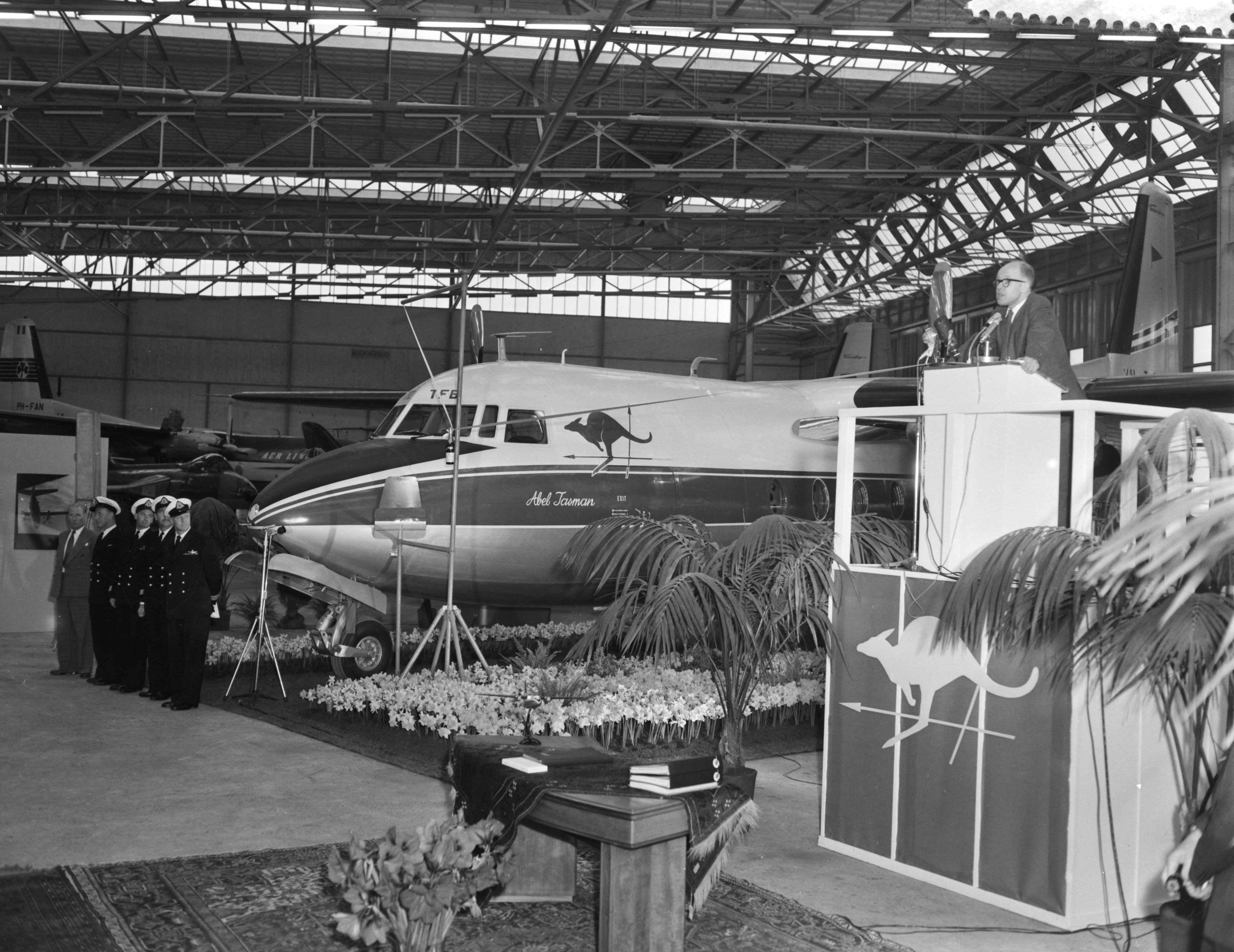 Collectie / Archief : Fotocollectie Anefo Reportage / Serie : [ onbekend ] Beschrijving : Overdracht Friendship aan de Trans Australian Airlines bij de Fokkerfabrieken te Amsterdam Datum : 6 april 1959 Fotograaf : Rossem, Wim van / Anefo Auteursrechthebbende : Nationaal Archief Materiaalsoort : Negatief (zwart/wit) Nummer archiefinventaris : bekijk toegang 2.24.01.04 Bestanddeelnummer : 910-2779